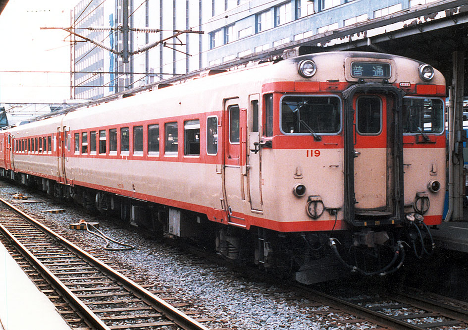 国鉄キハ27 119